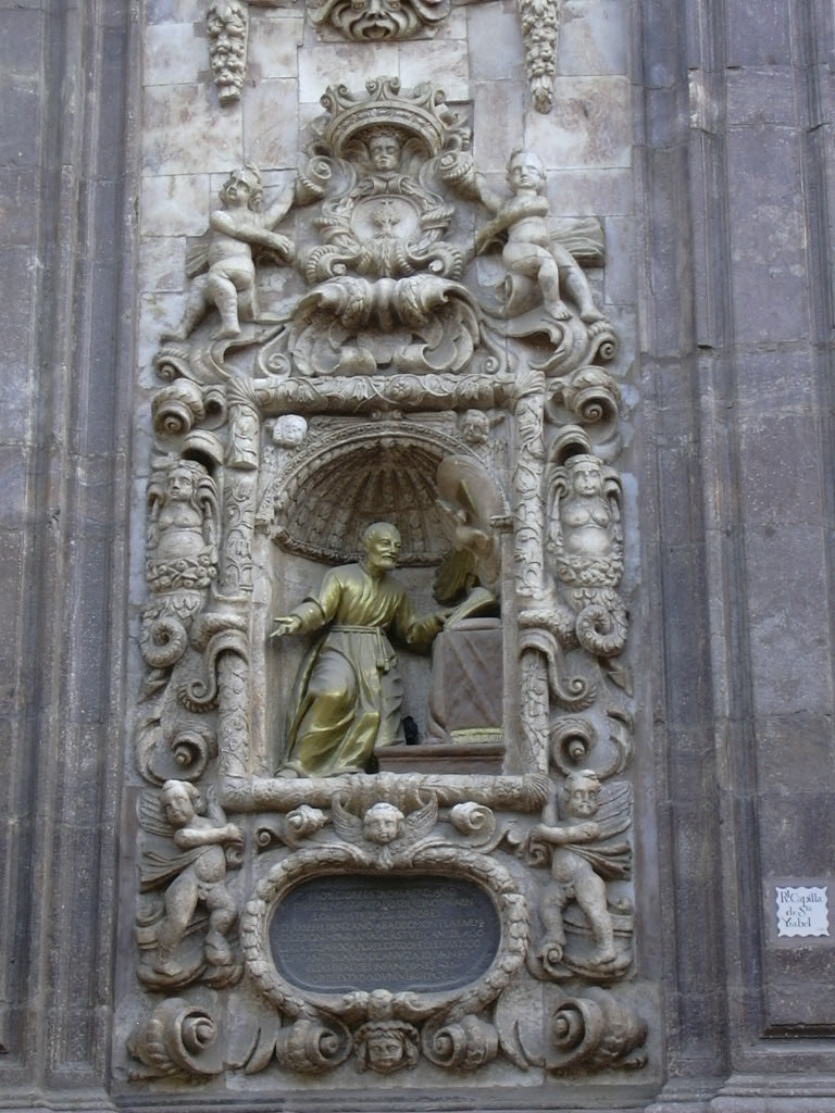 Zaragoza - Iglesia de Santa Isabel de Portugal - Barroco de los siglos XVII y XVIII - Detalle de fachada principal